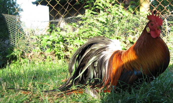 1,0 Ohiki Hahn